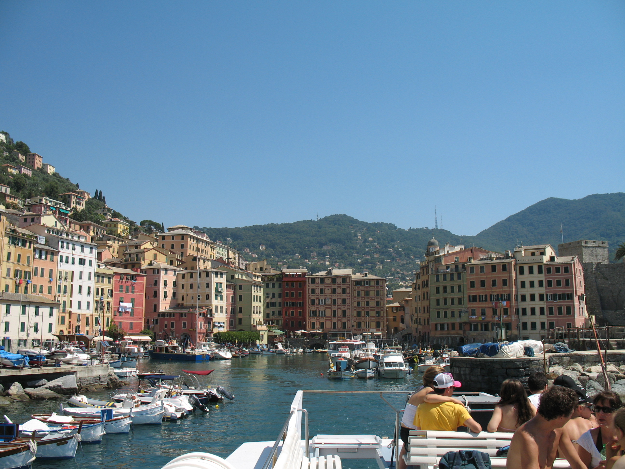 Camogli